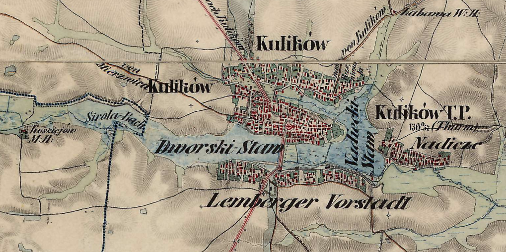 xviii